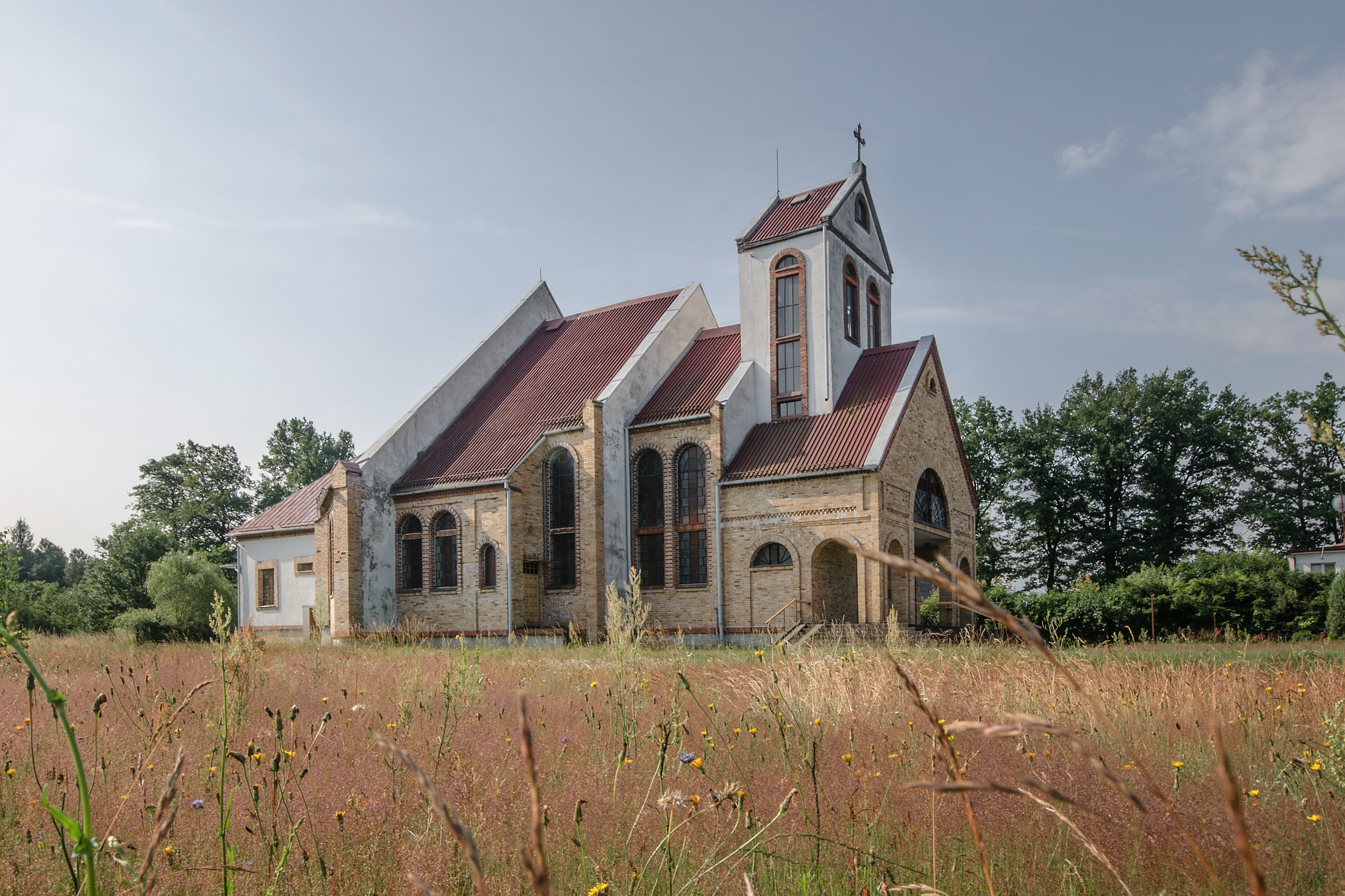 Kościół Matki Boskiej Częstochowskiej w Rokitkach, woj. dolnośląskie, pow. legnicki, gm. Chojnów